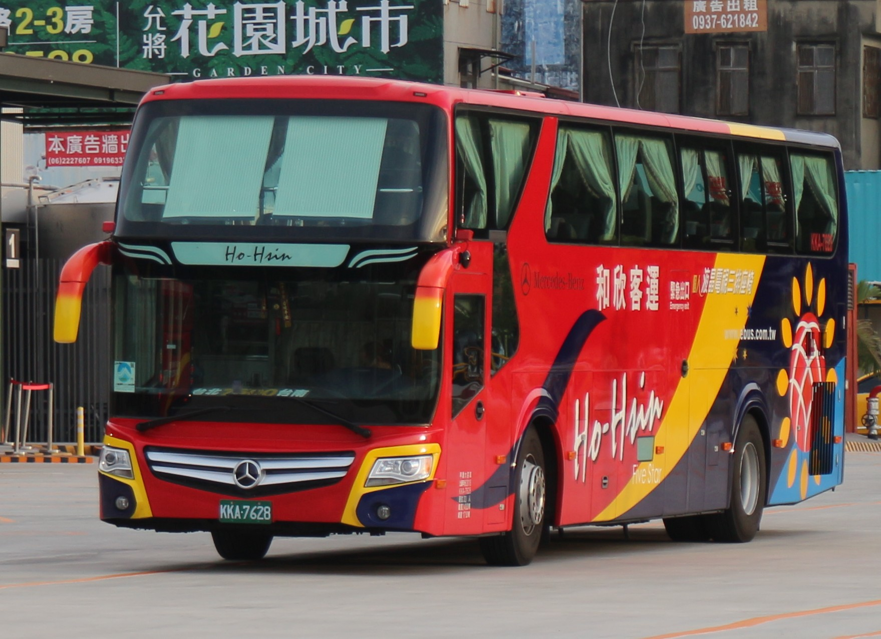 和欣客運 Mercedes-Benz O500 (KKA-7628)